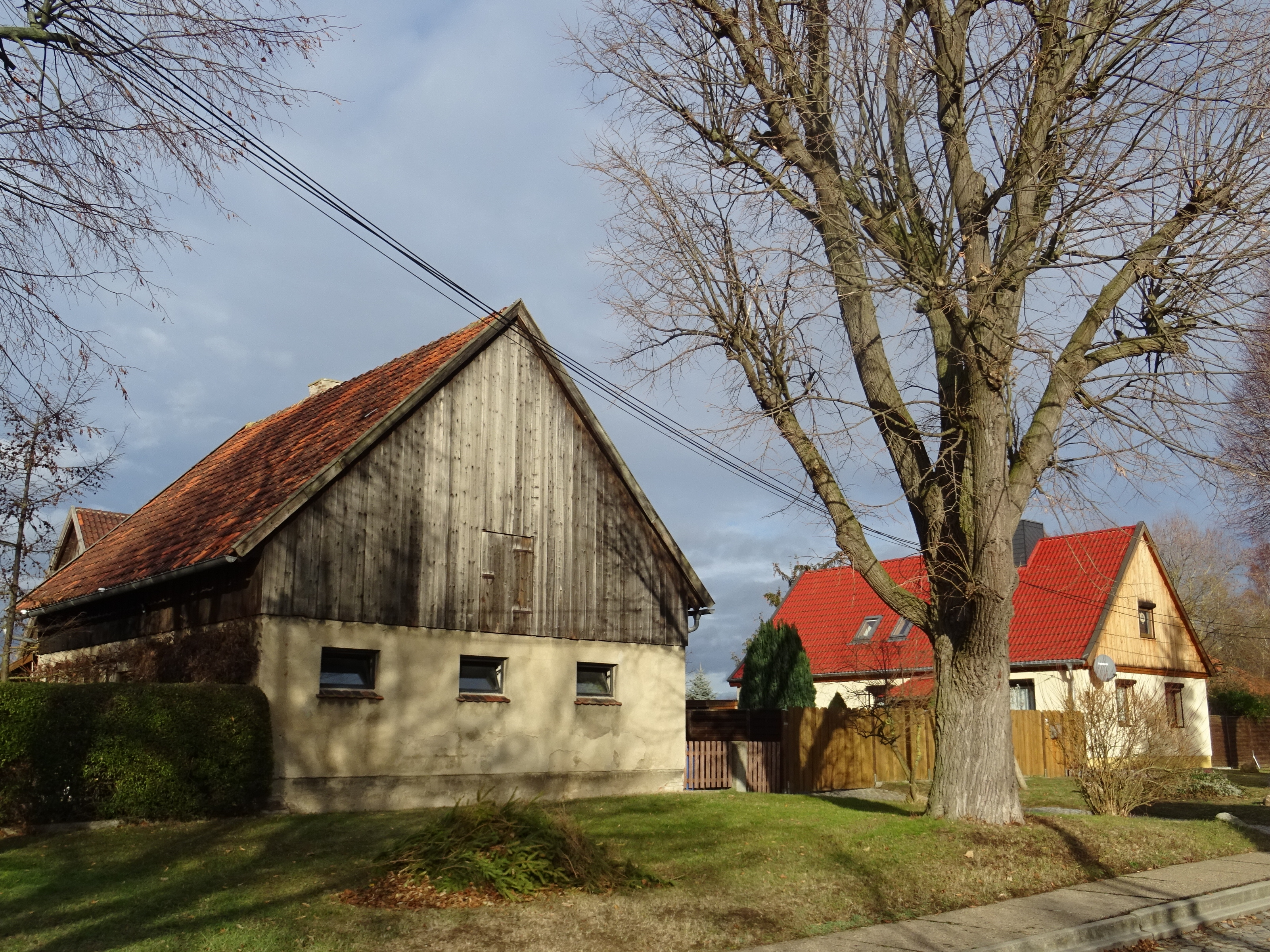 Blumenberg, Stadt Wanzleben, denkmalgeschützter Bauernhof Am Hahneberg 18/18a